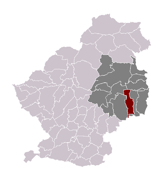 Fenain dans son canton et son arrondissement